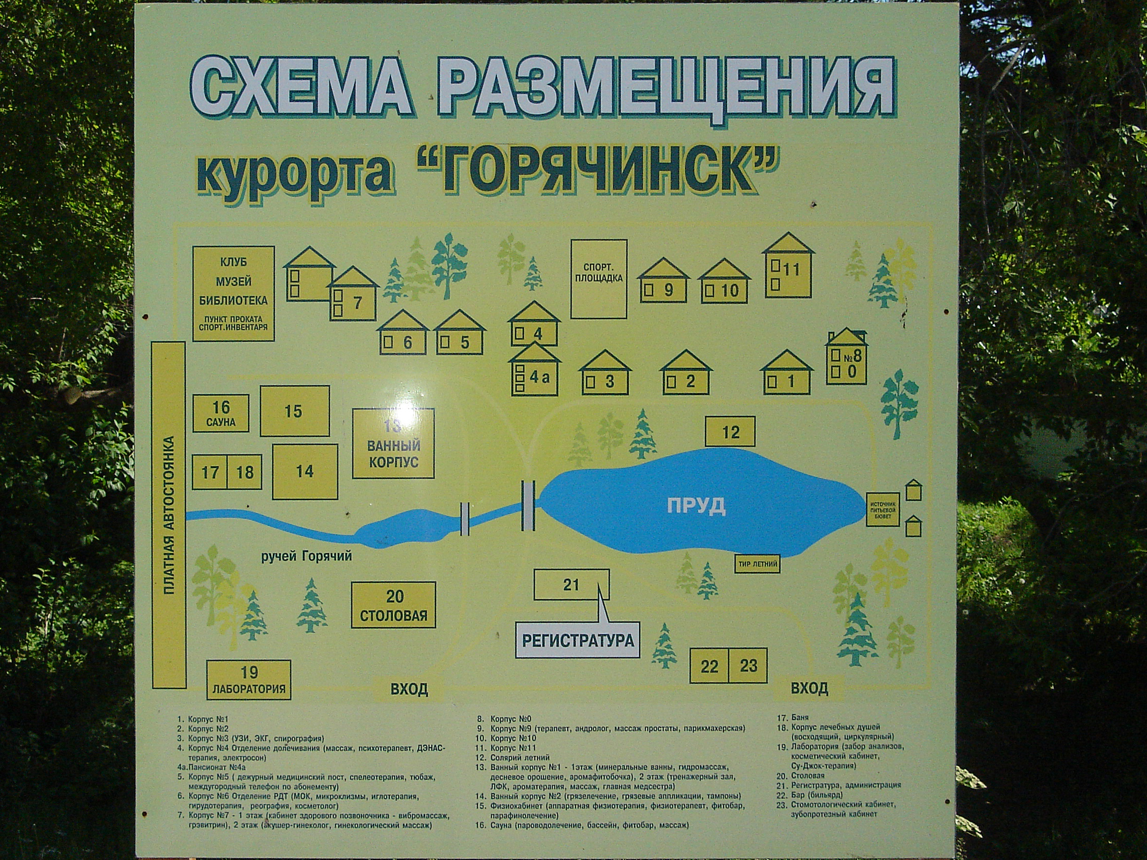 Село Горячинск, Республика Бурятия, Россия. Схема курорта "Горячинск"